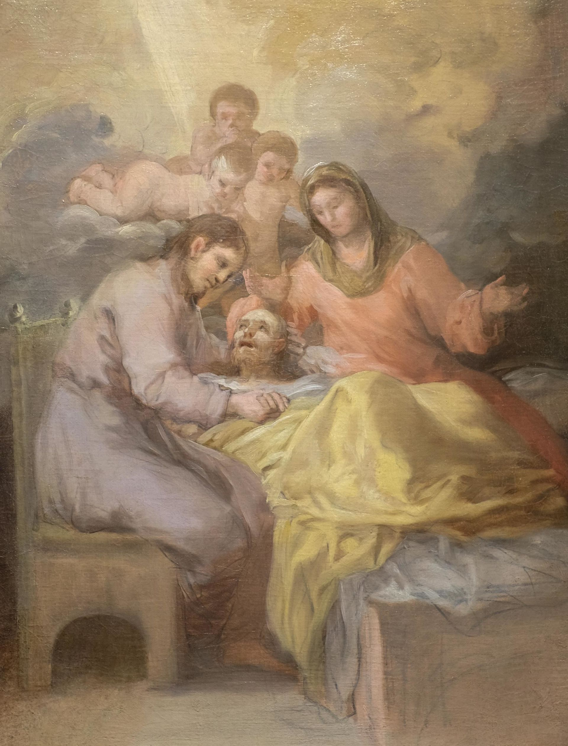 La obra representa el tránsito o la muerte de San José, el padre de Jesucristo. Se trata de un boceto o unas de las primeras ideas para el cuadro del Real Monasterio de San Joaquín y Santa Ana, con distinta composición final